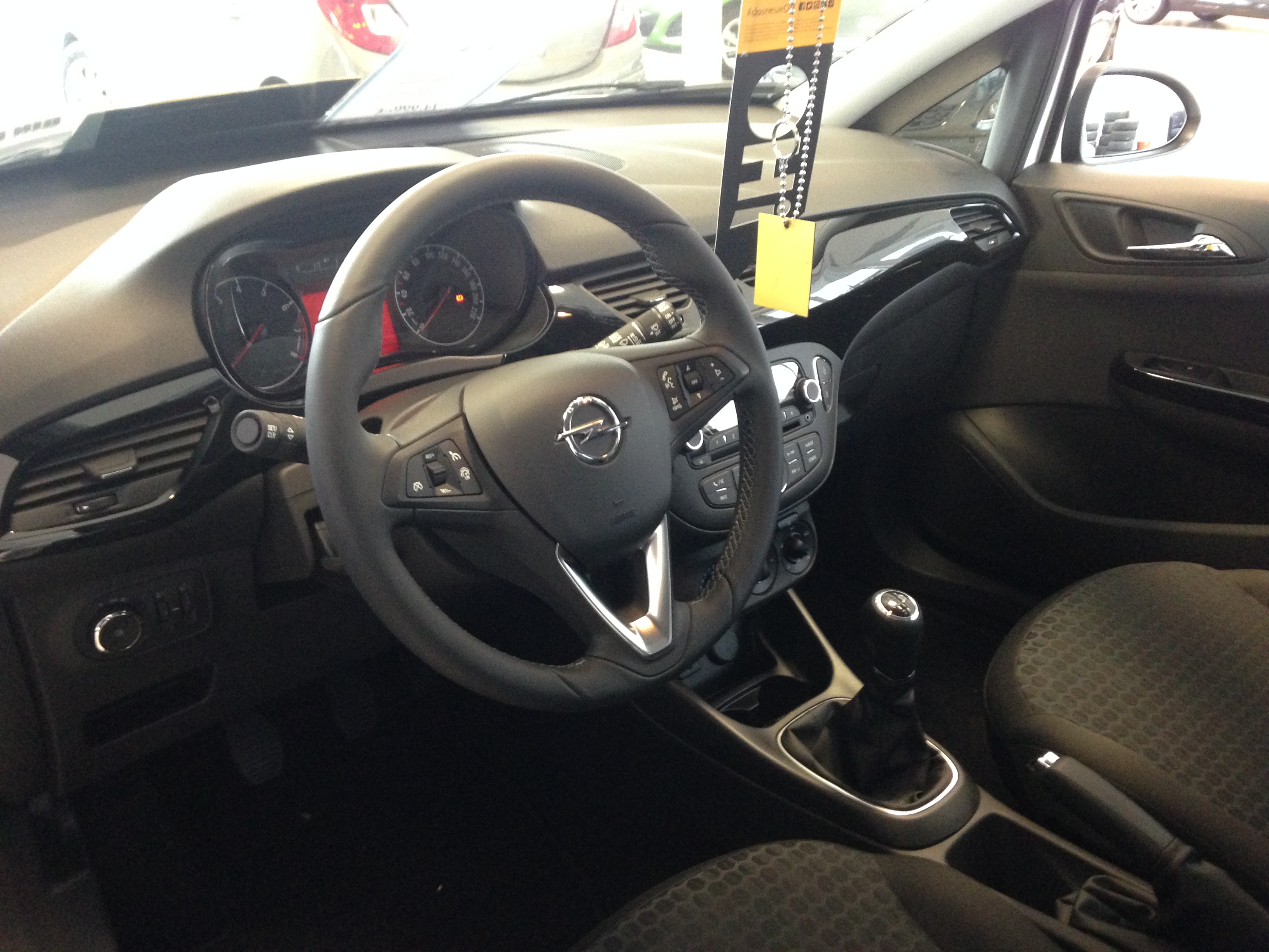 Opel Corsa (Baureihe "E") - Innenraum